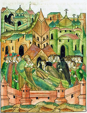 Архиеп. Далмат перед смертью благословляет игум. Давида в преемники. Миниатюра из Лицевого летописного свода. 70-е гг. XVI в. (БАН. 30.7.30. Л. 77 об.)